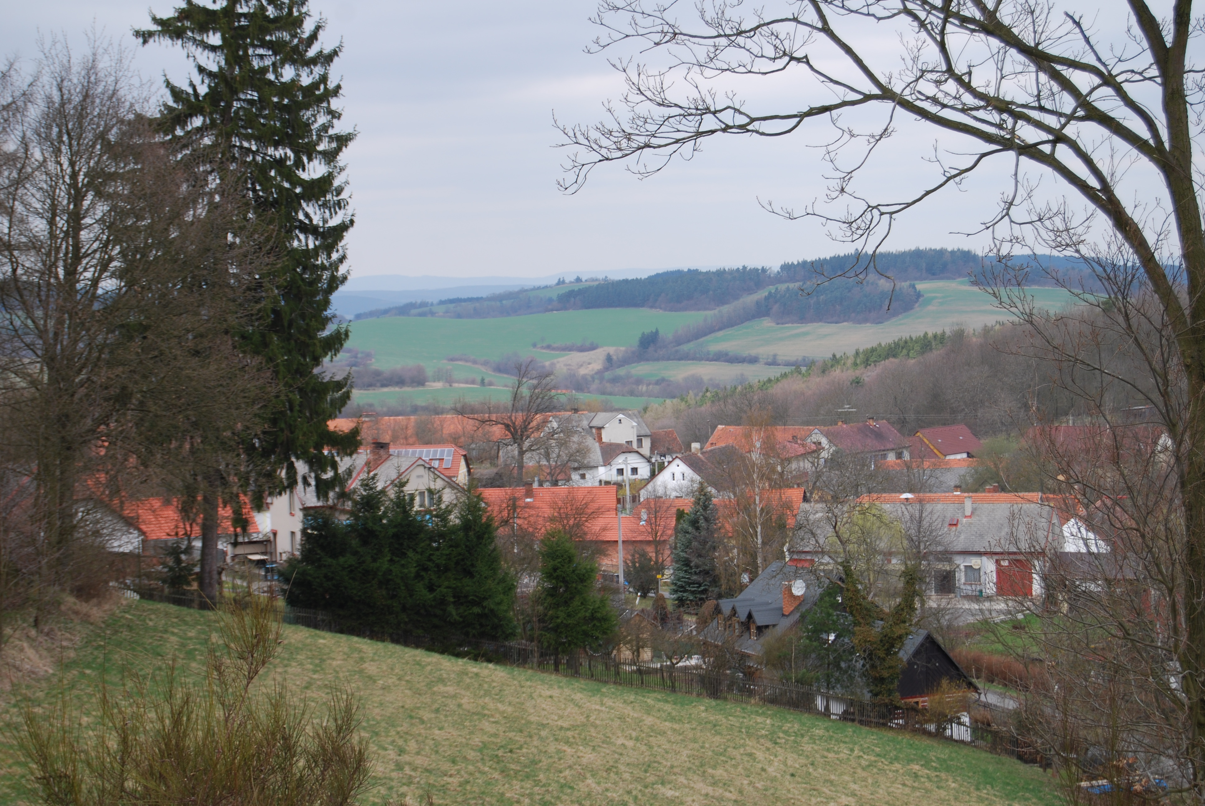 Pohled na obec z naučné petrovické stezky ze směru od Kuníčka. Kuní (Petrovice). Okres Příbram. Česká republika.